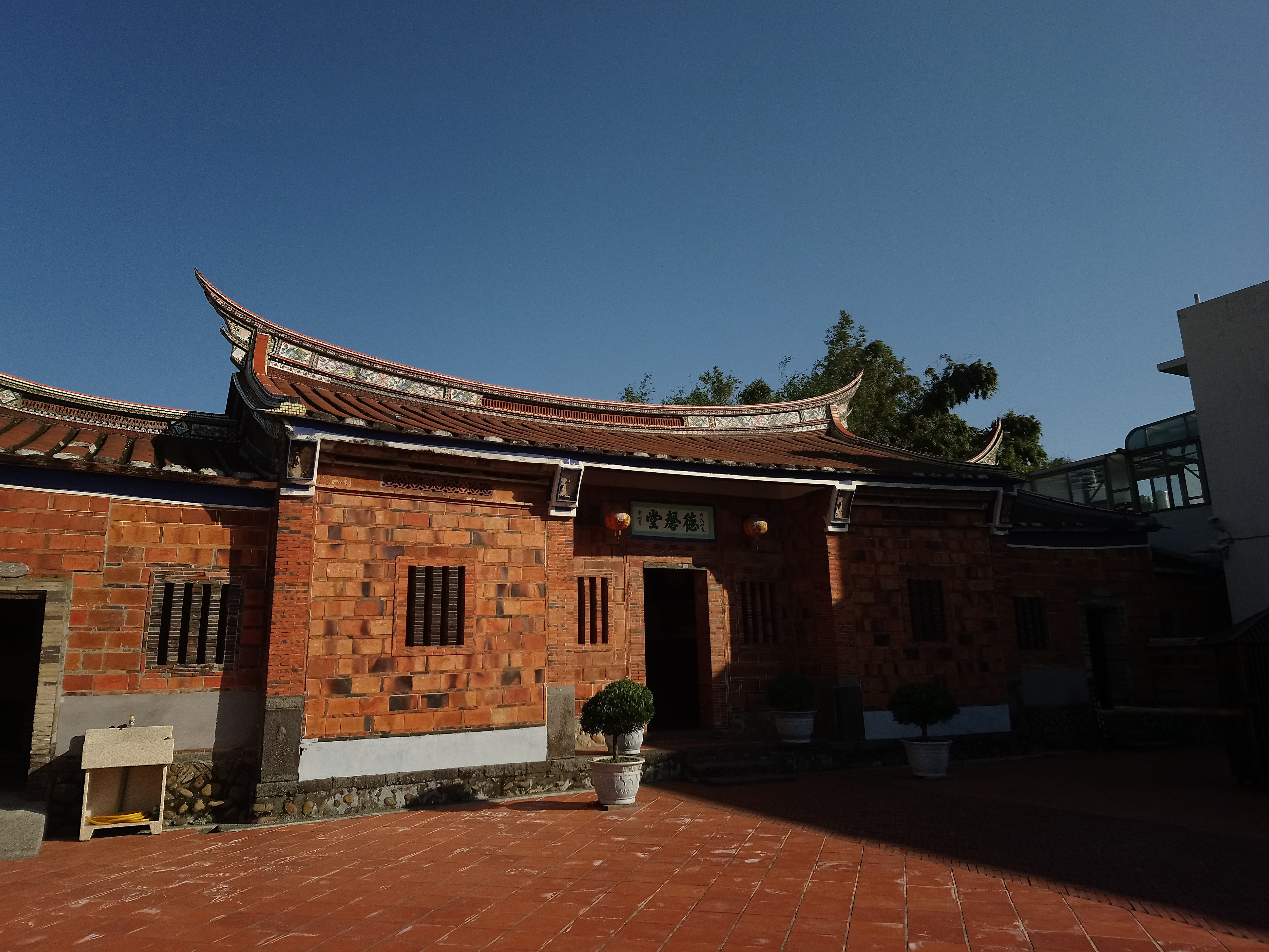 蘆竹德馨堂近景,桃園市蘆竹區南崁地區山鼻里